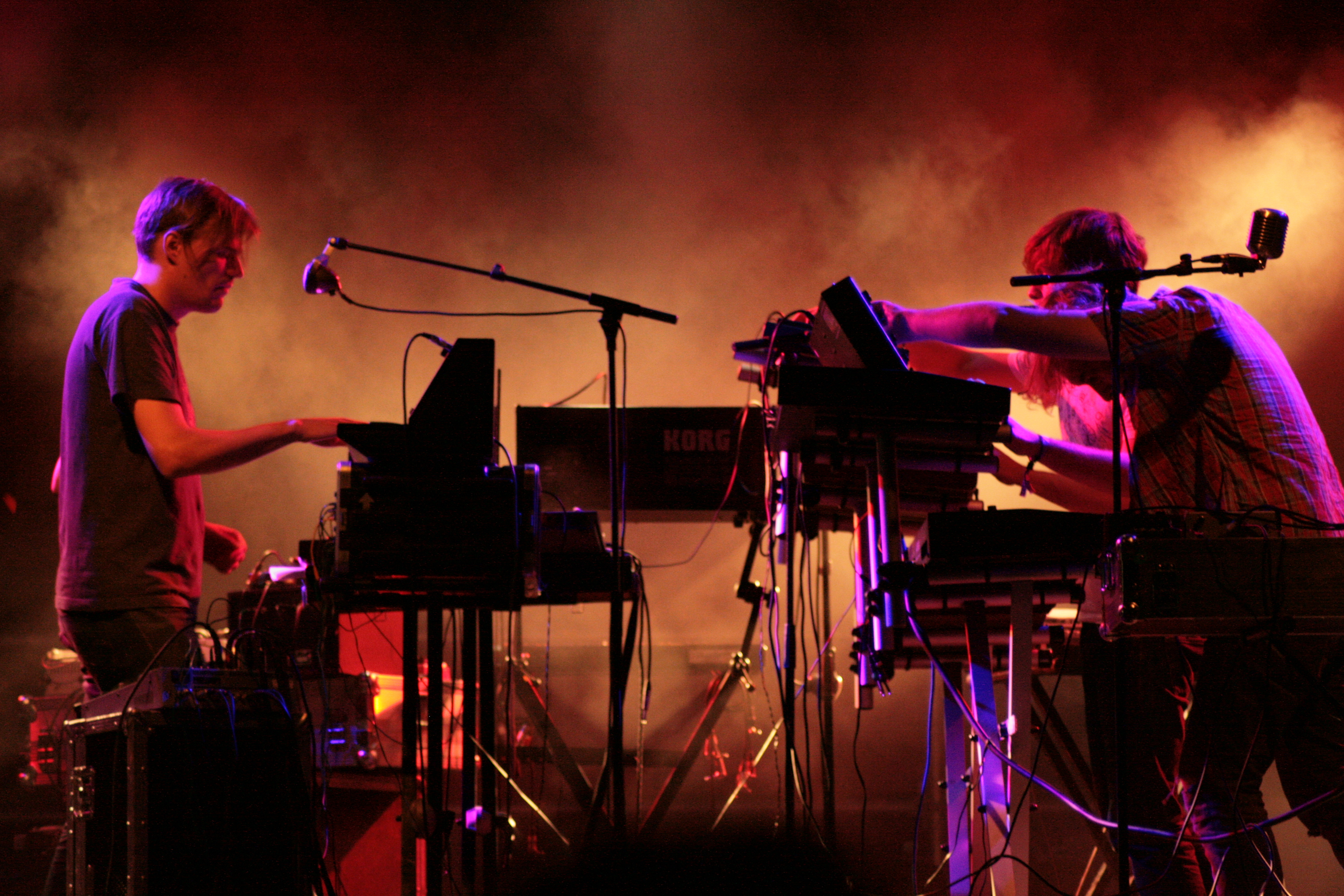 Concerto Yann Tiersen alla Mole di Ancona 21-07-11.